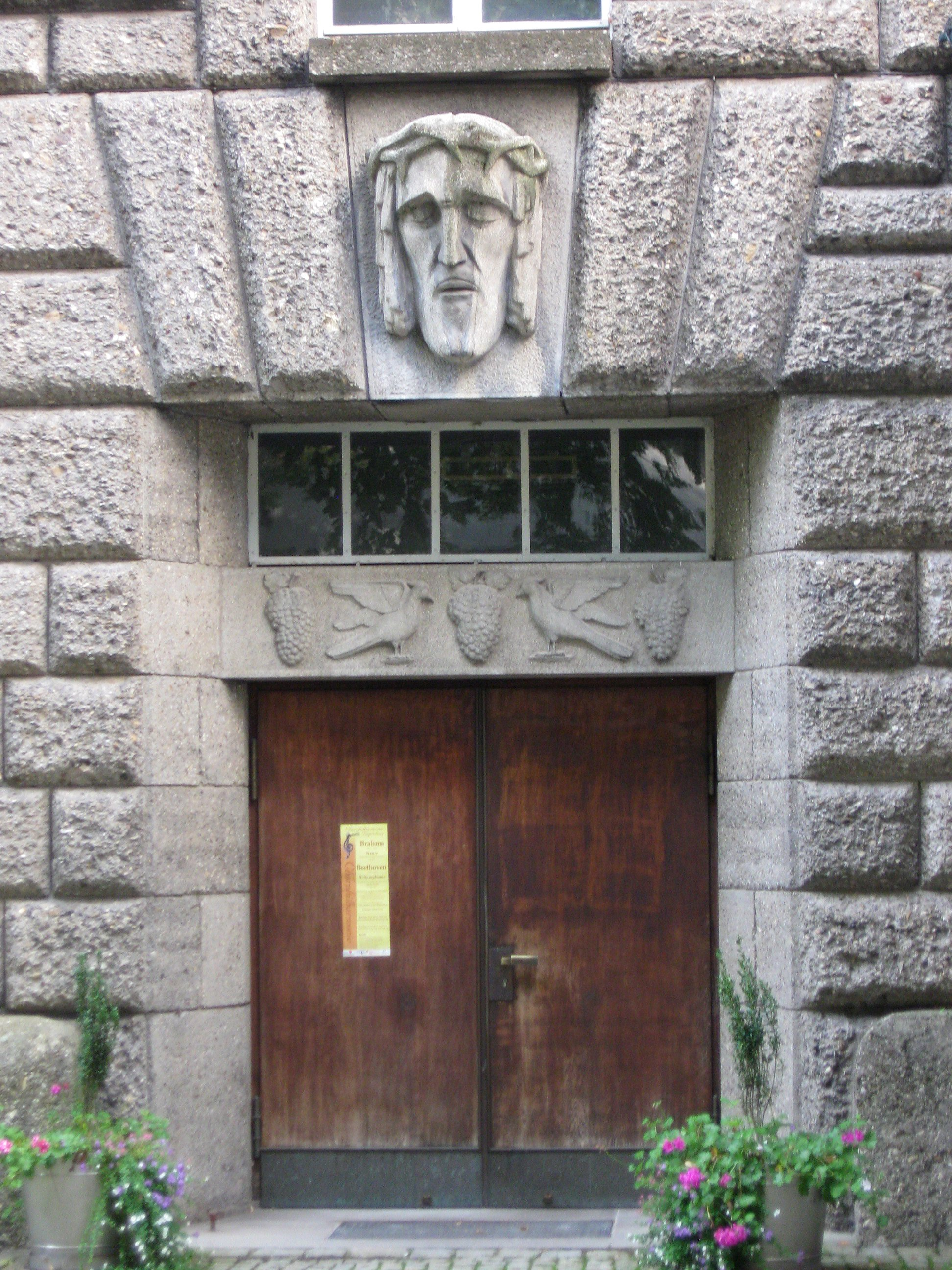 Kreuzgasse 20; Kath. Pfarrkirche Herz Jesu, dreischiffige Basilika mit Satteldach, eingezogenem Chor mit Walmdach und unvollendetem Südturm, verputzter Ziegelbau, Turm mit Hausteinverkleidung, spätexpressionistisch, 1928-30 von Carl Schad; mit Ausstattung